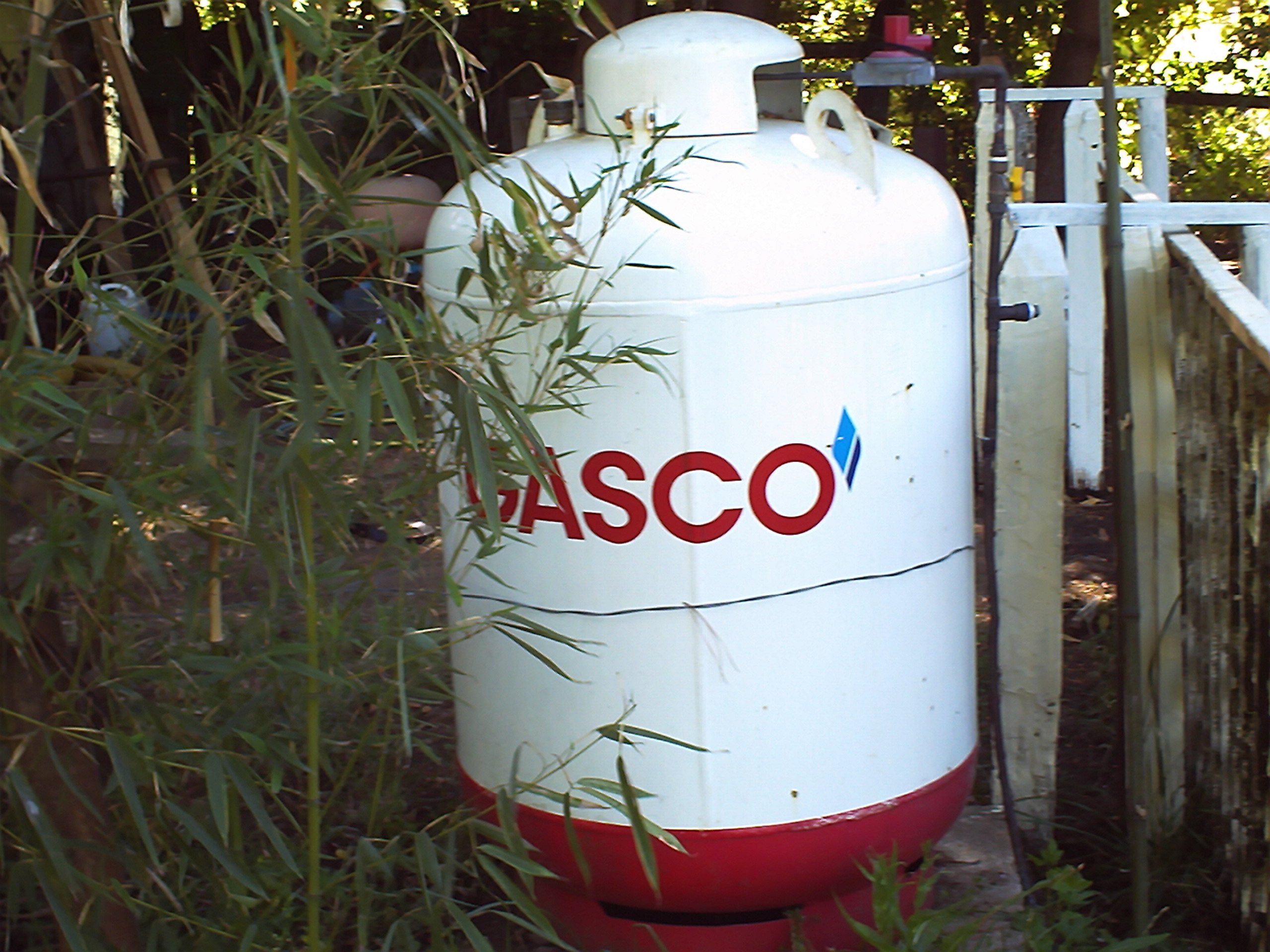 Galon de la empresa GASCO